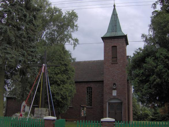 Kościół w Krępsku, woj. zachodniopomorskie. Autor: Maks Saczywko (Soczewa)